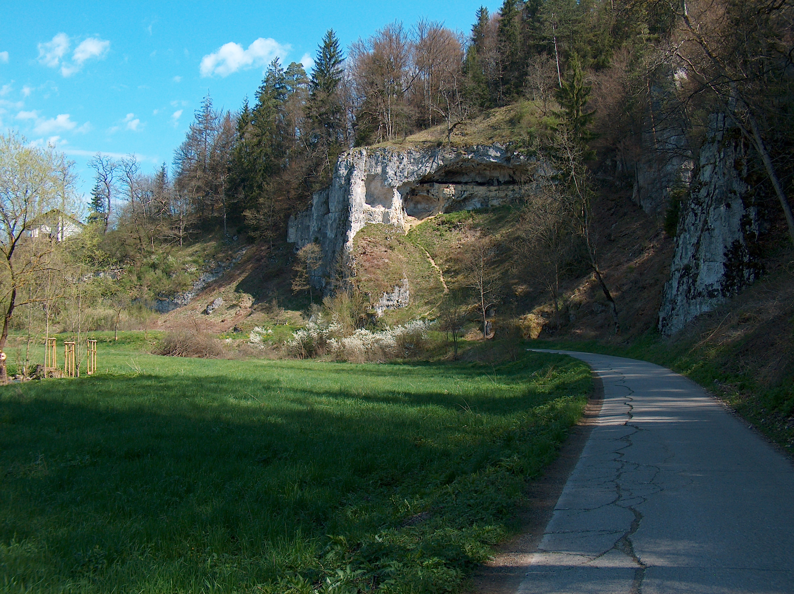 Das wildromantische Tal der Schmeie, unterhalb von Unterschmeien